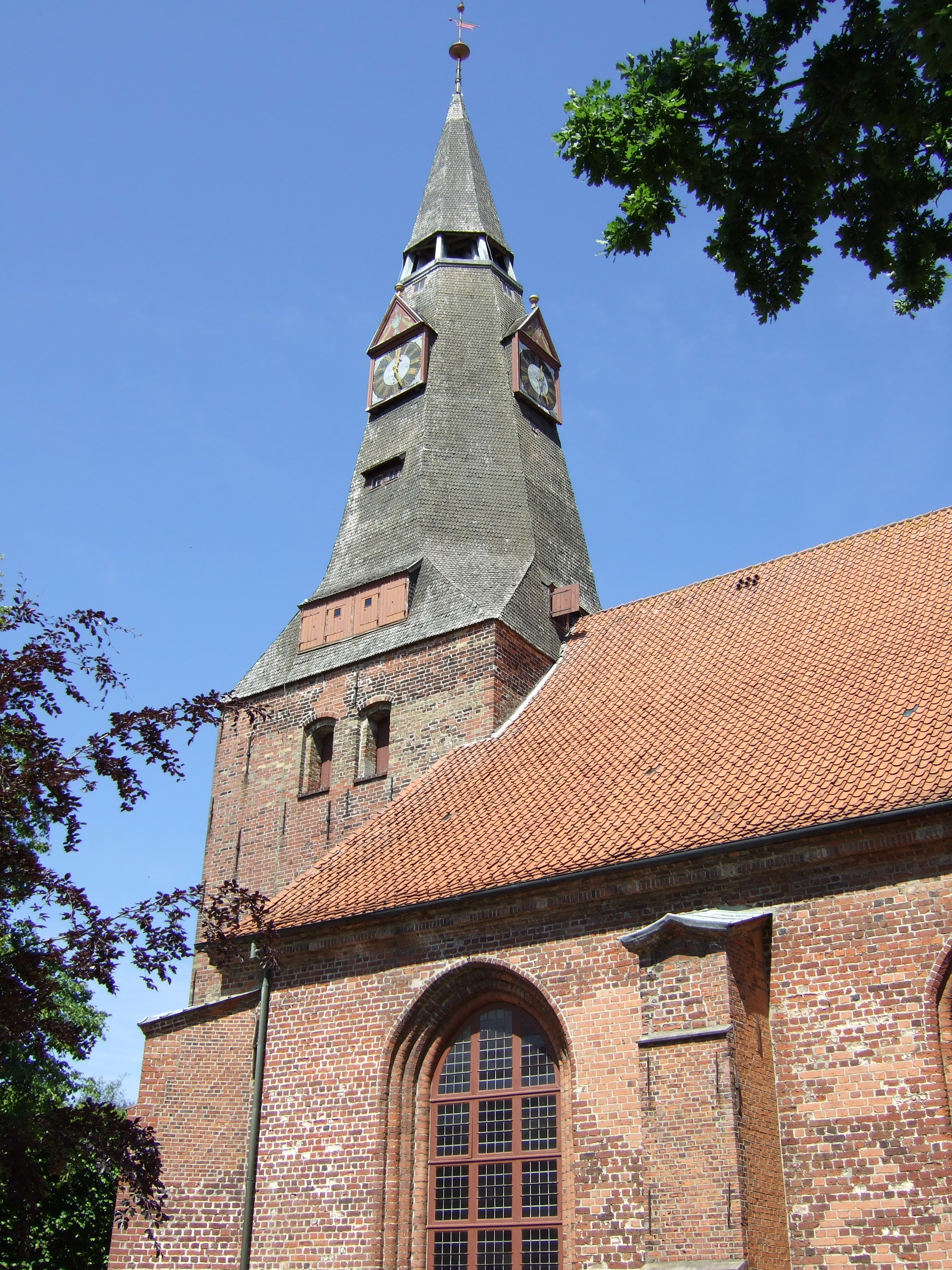 Christkirche in Tondern / Christ Church in Tønder / Tønder Kristkirke